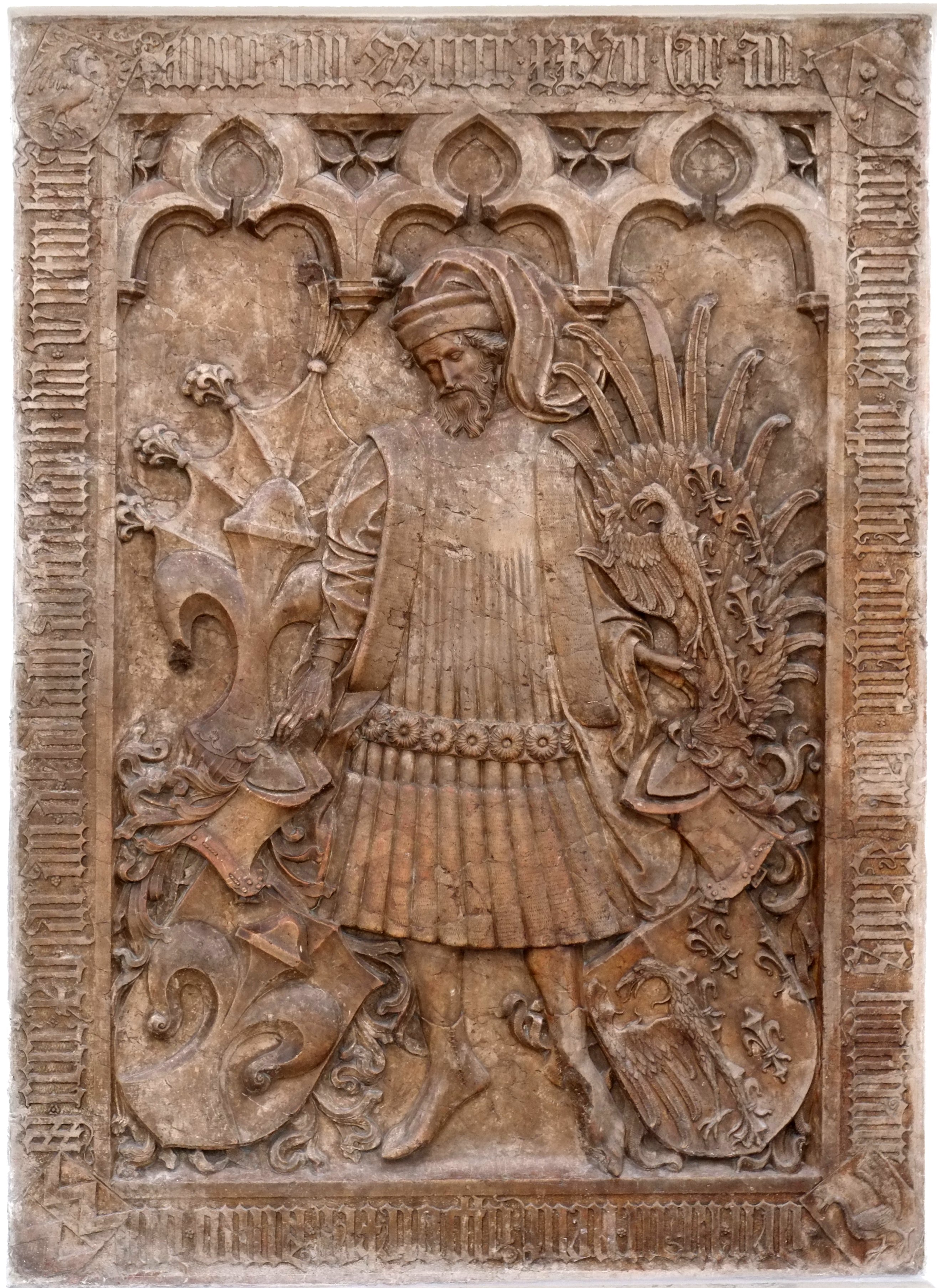 St. Moritz in Augsburg (Bayern, Deutschland), Epitaph für Claus Hofmair († 1427) und seine Frau Barbara († 1157)